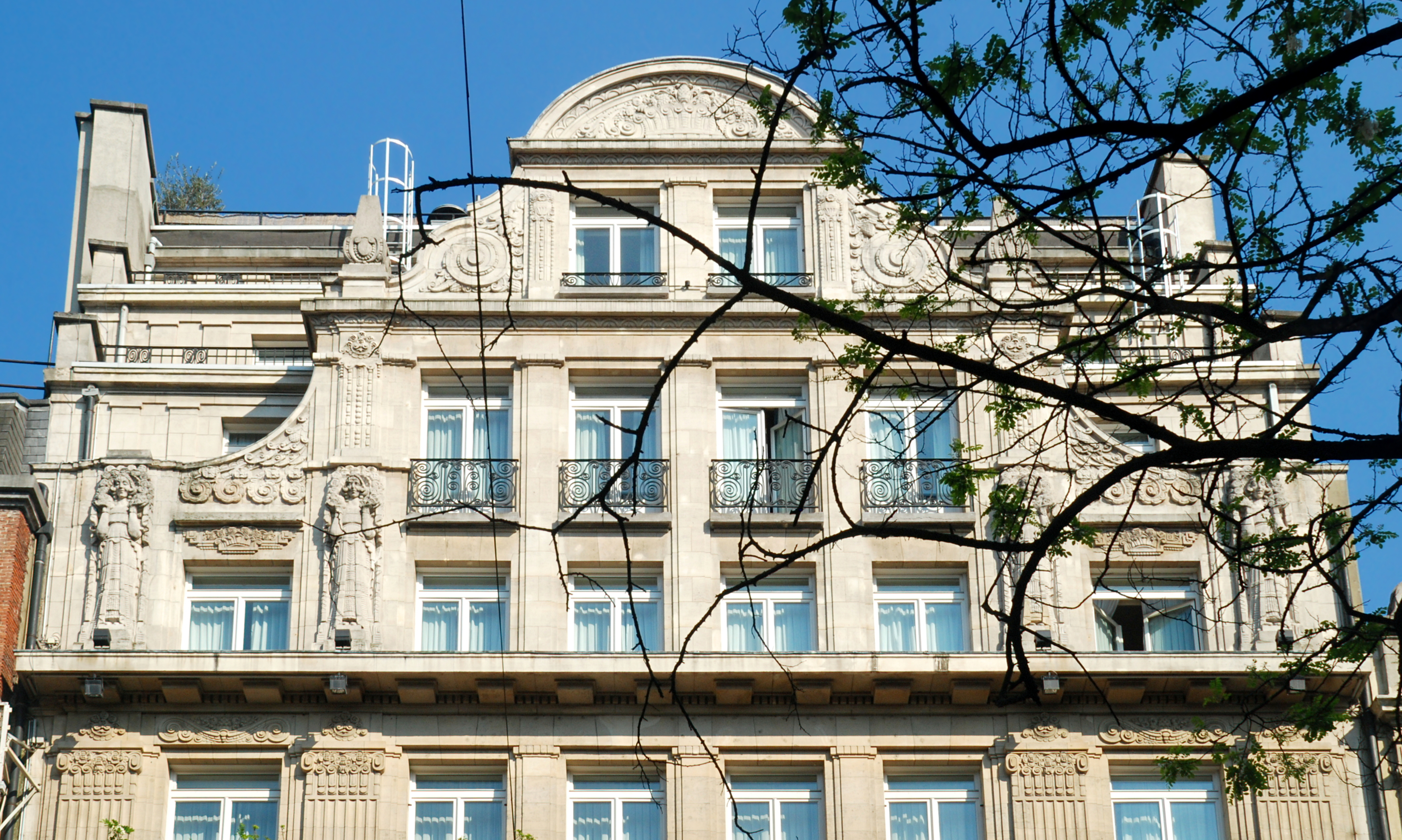 Belgique - Bruxelles - Bvd Adolphe Max 5-9 - Hôtel Atlanta (Art déco - Michel Polak - 1924-1929)